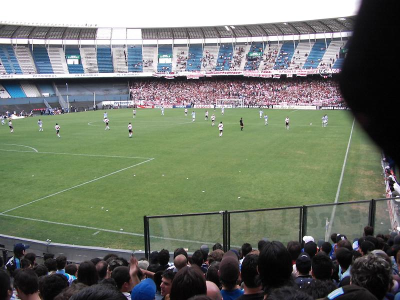 Racing vs River en 2006